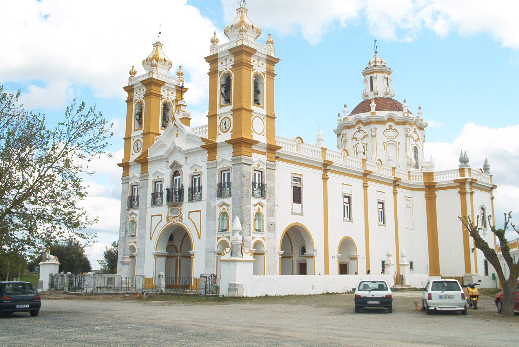 Santuário de Nossa Senhora d'Aires. Viana do Alentejo. Portugal.